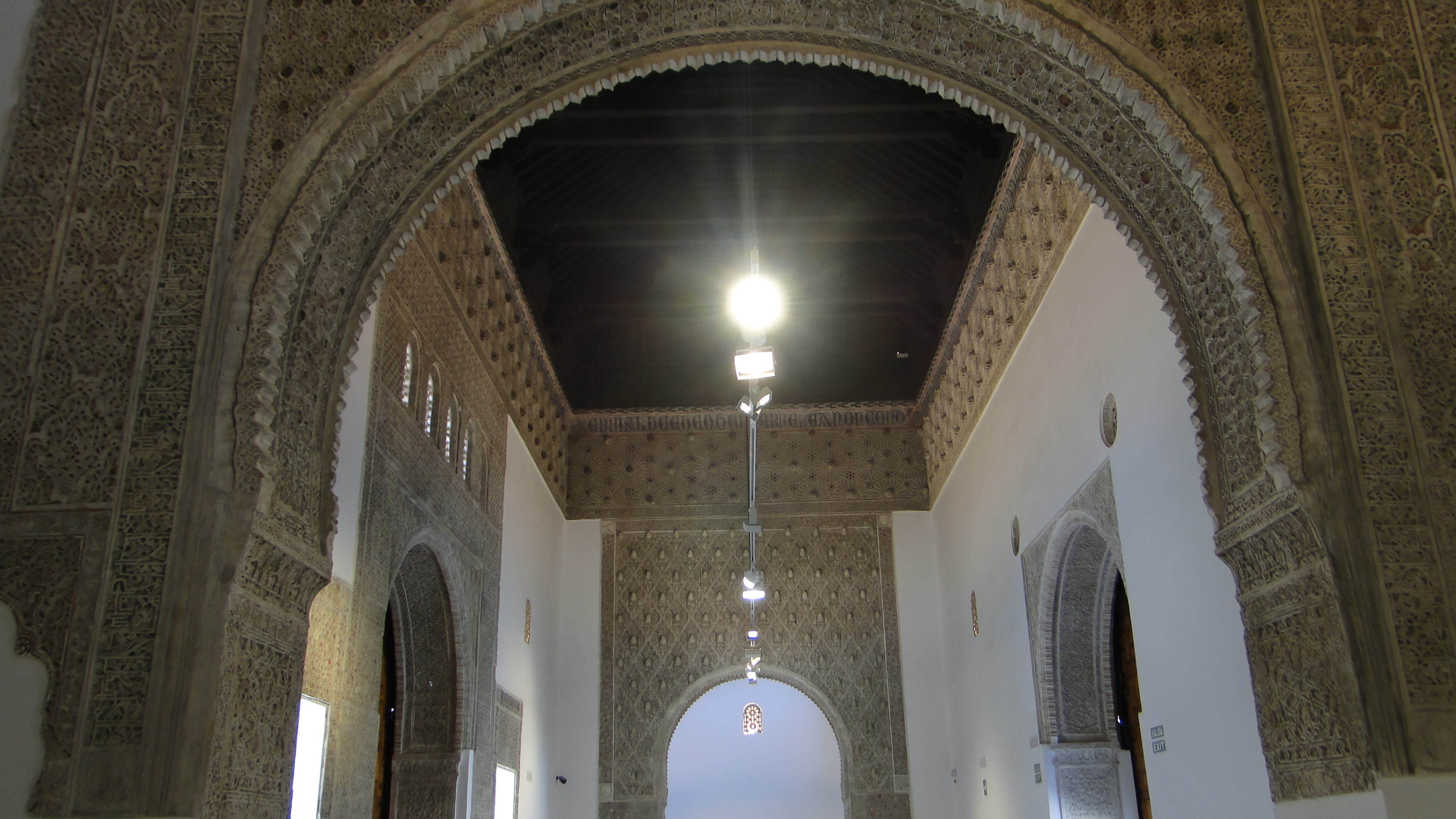 Taller del Moro (Toledo)